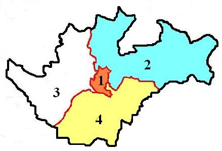 Le découpage des cantons dans Béziers image personnelle